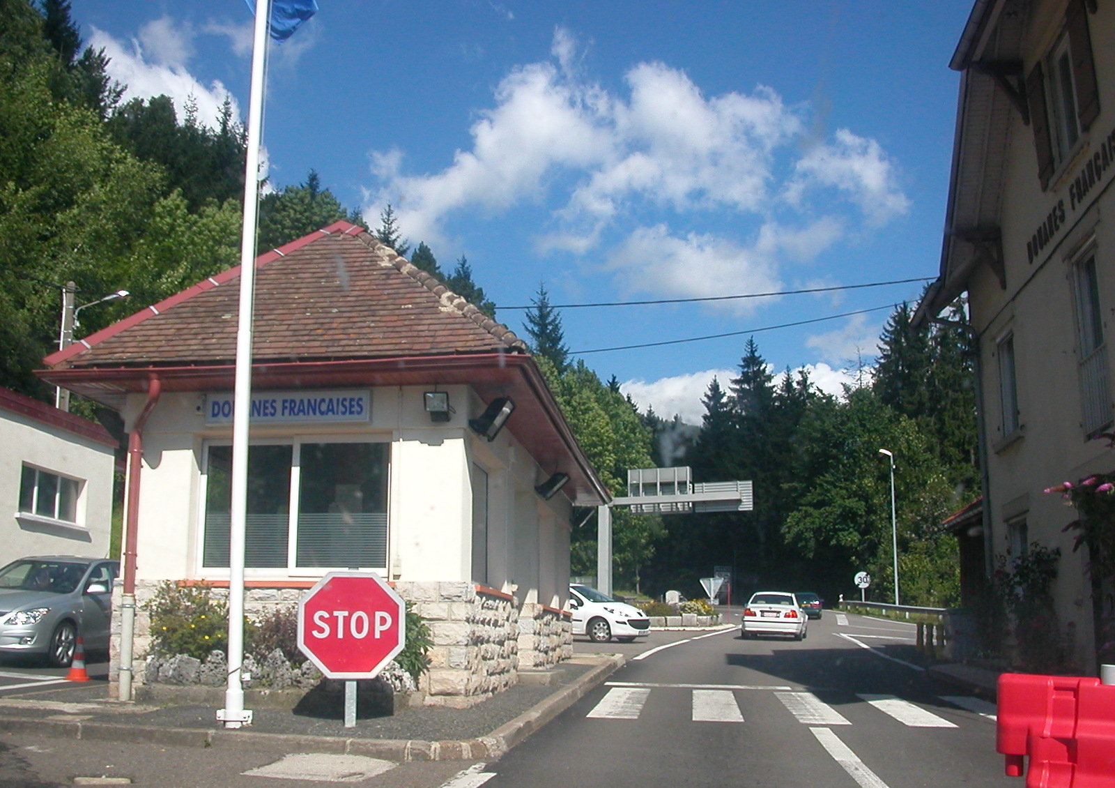 Douane franco-suisse à Jougne en venant de Vallorbe